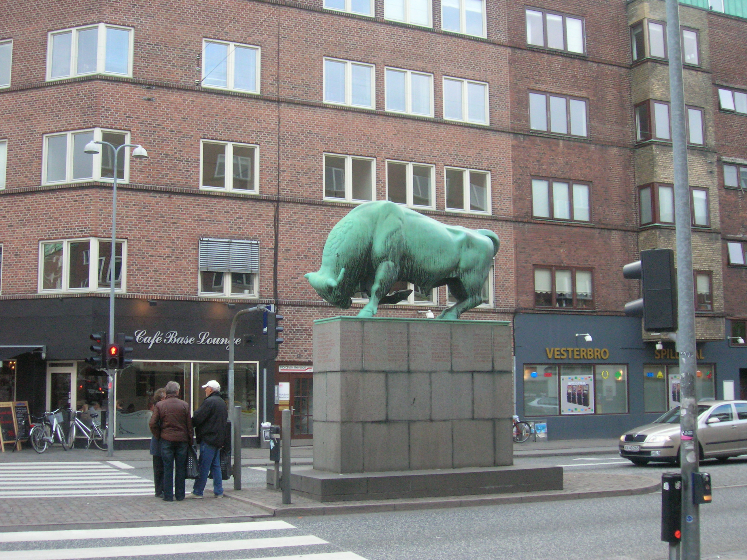 Homenaje a la tribu Cimbri que luchó contra el Imperio Romano sobre el 200 antes de Cristo (más o menos). Es un elogio al entusiasmo aventurero del pueblo Cimbri.